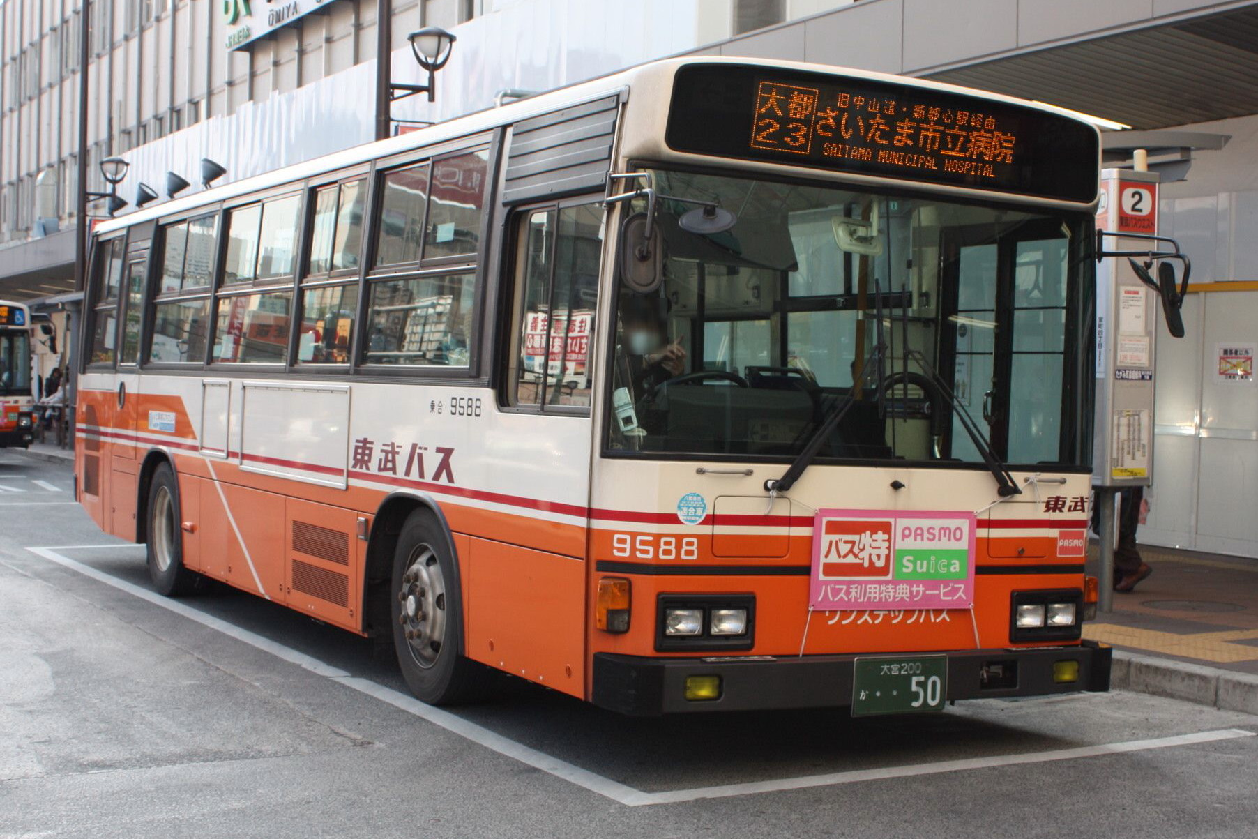 東武バスウエスト大宮営業事務所 車番:9588 KC-HU2MLCA 大宮駅東口にて